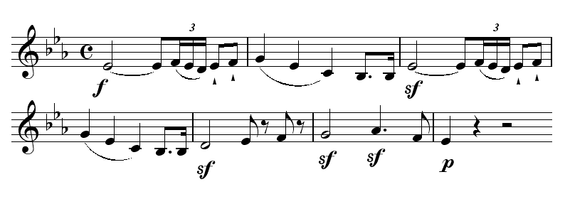 Thème principal du Concerto pour piano n° 5 de Ludwig van Beethoven (entrée des violons) Principal theme from Ludwig van Beethoven's Piano Concerto No. 5 (violins)